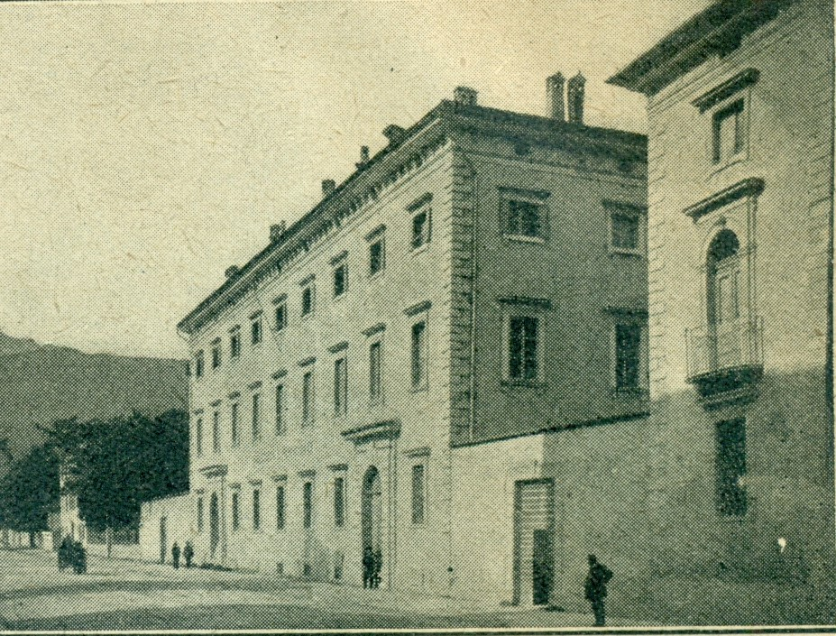 Palazzo Annona Foto originale anni 20 - biblioteca personale